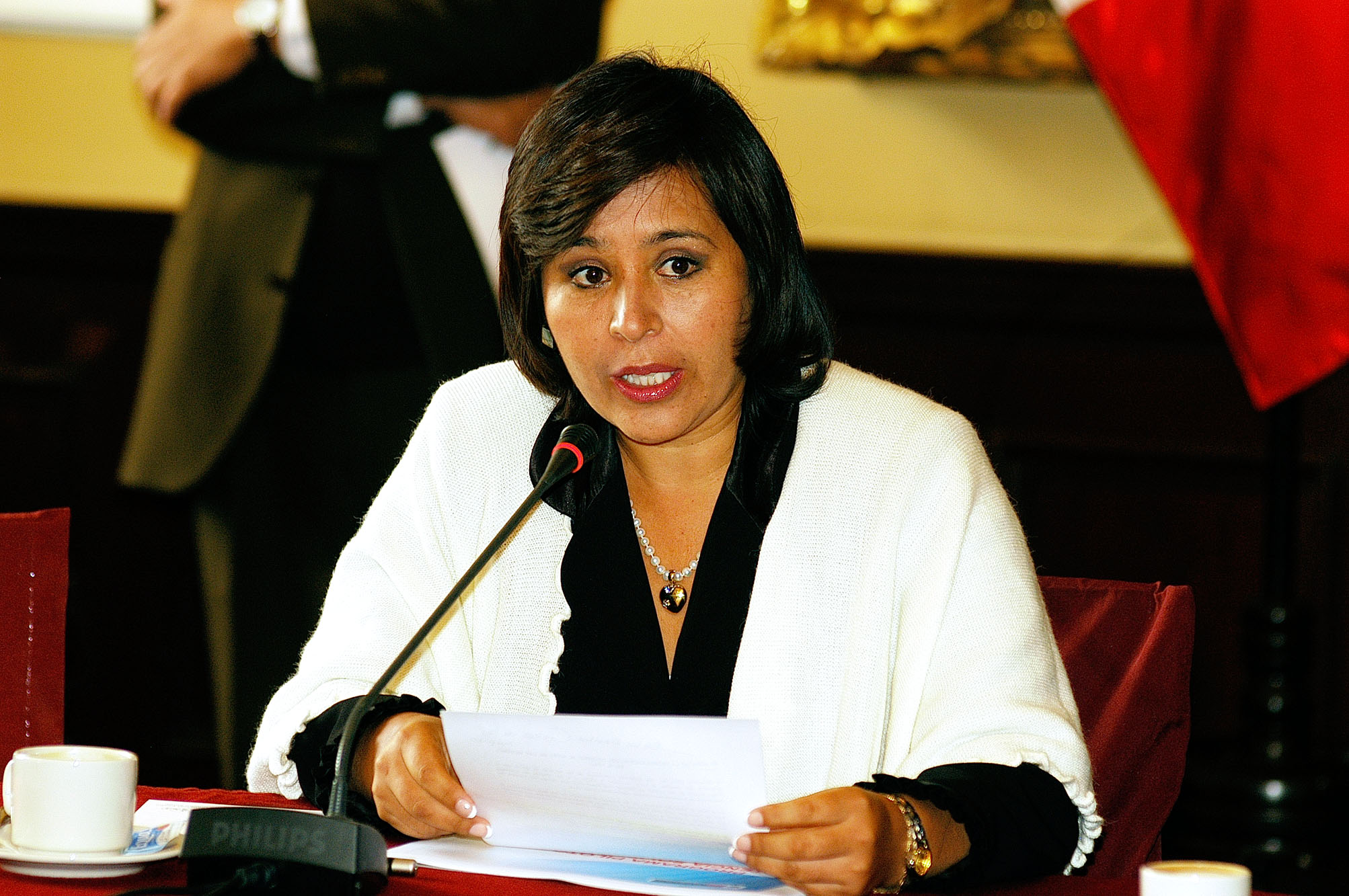 La ministra de la Mujer, Nidia Vílchez Yucra, sustenta en la Comisión de Presupuesto un proyecto de decreto de urgencia por el cual se propone dictar medidas extraordinarias para crear el Programa Piloto de Asistencia Solidaria: Gratitud.